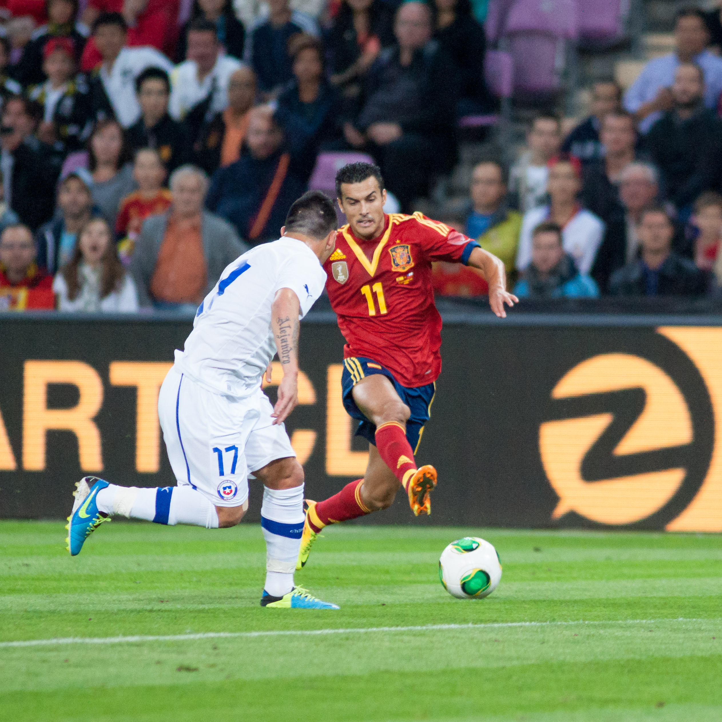 Espagne - Chili, 10 septembre 2013.